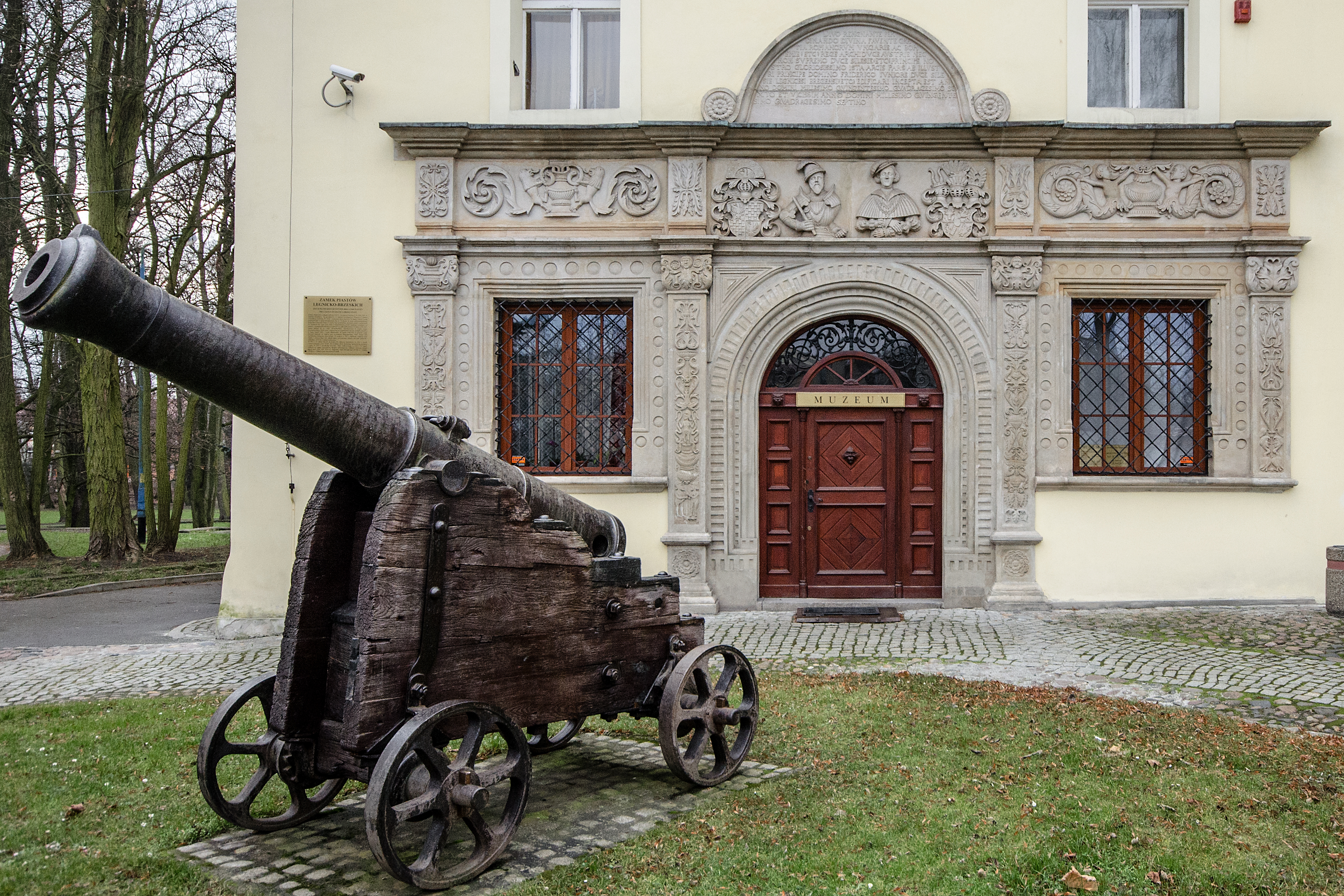 Chojnów, zamek, ob. Muzeum Regionalne, XIV, XX